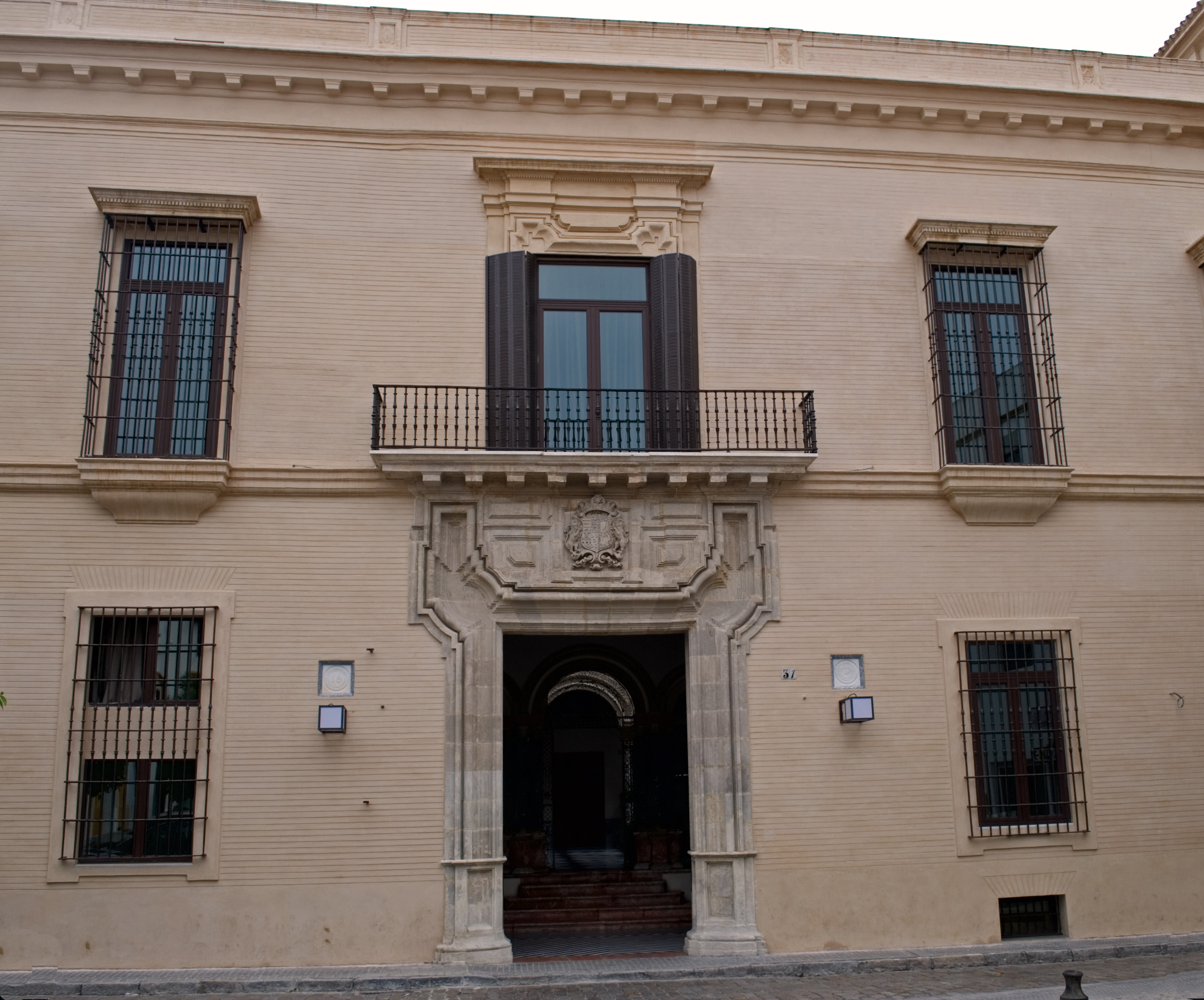 Palacio de los marqueses de Villapanés, siglo XVIII, Sevilla.